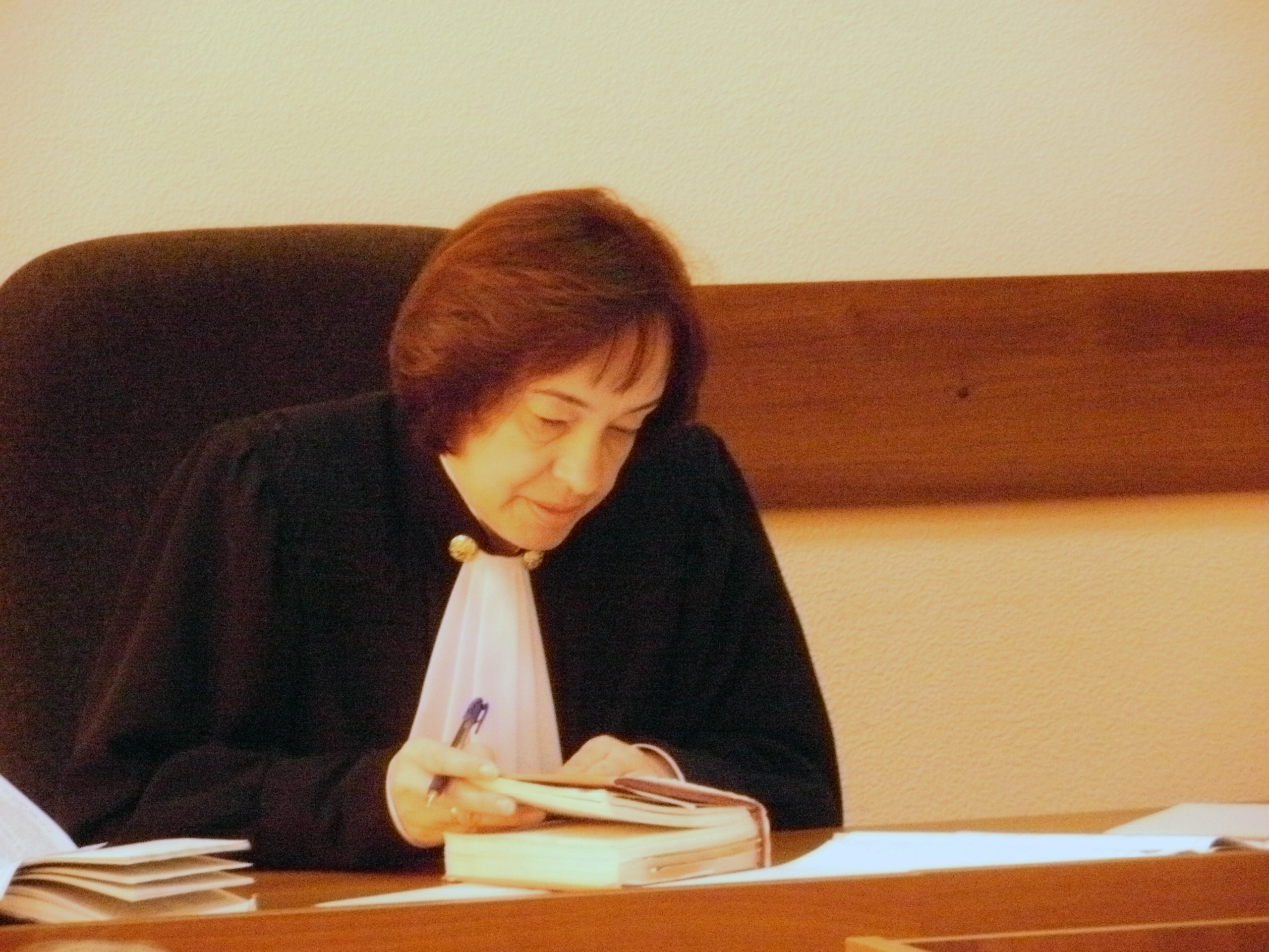 Судья Галина Бутенко на первом судебном заседании по делу о признании книги "Бхагавад-гита как она есть" экстремистским материалом.